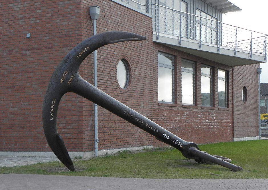 der Anker der SMS König Wilhelm 1868